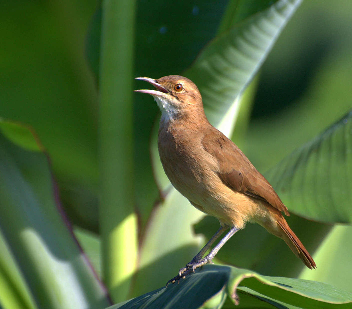 Margem do rio Ribeira de Iguape próximo à cidade de Registro-SP